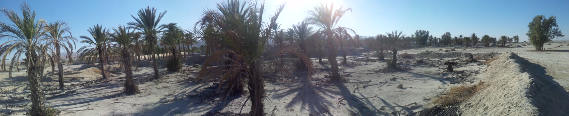 Farm of palmes in Chah Varz